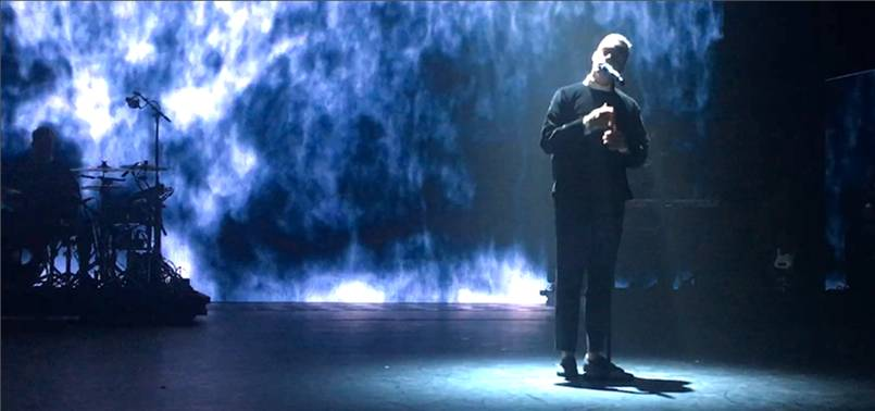 Photo : Vincent MASSIMI